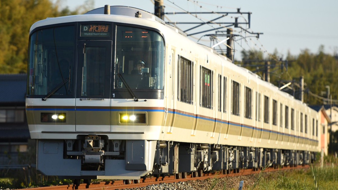 みやこ路快速京都行き 221系NC601編成